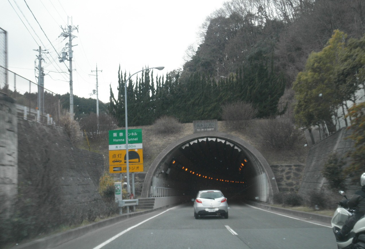 阪奈トンネル 上り線